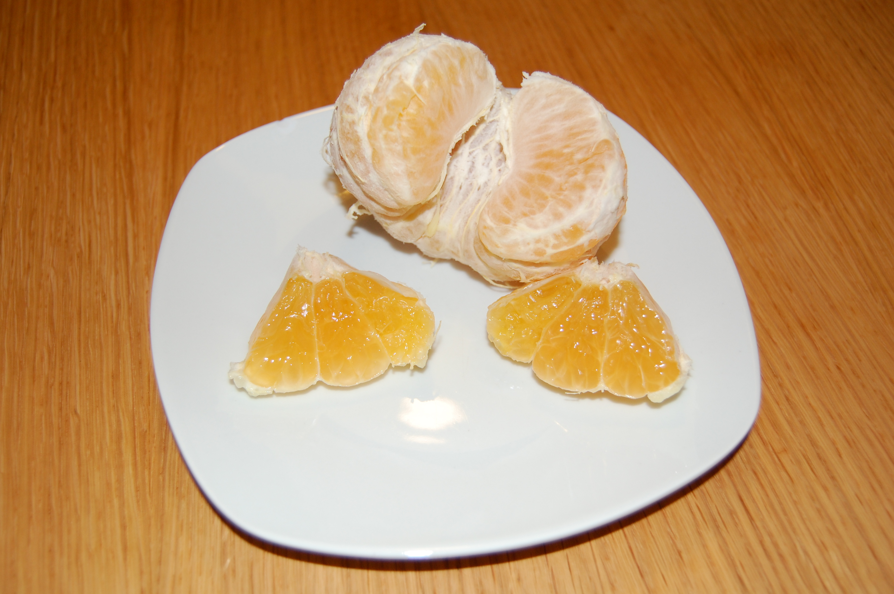 UGLI® fruit open